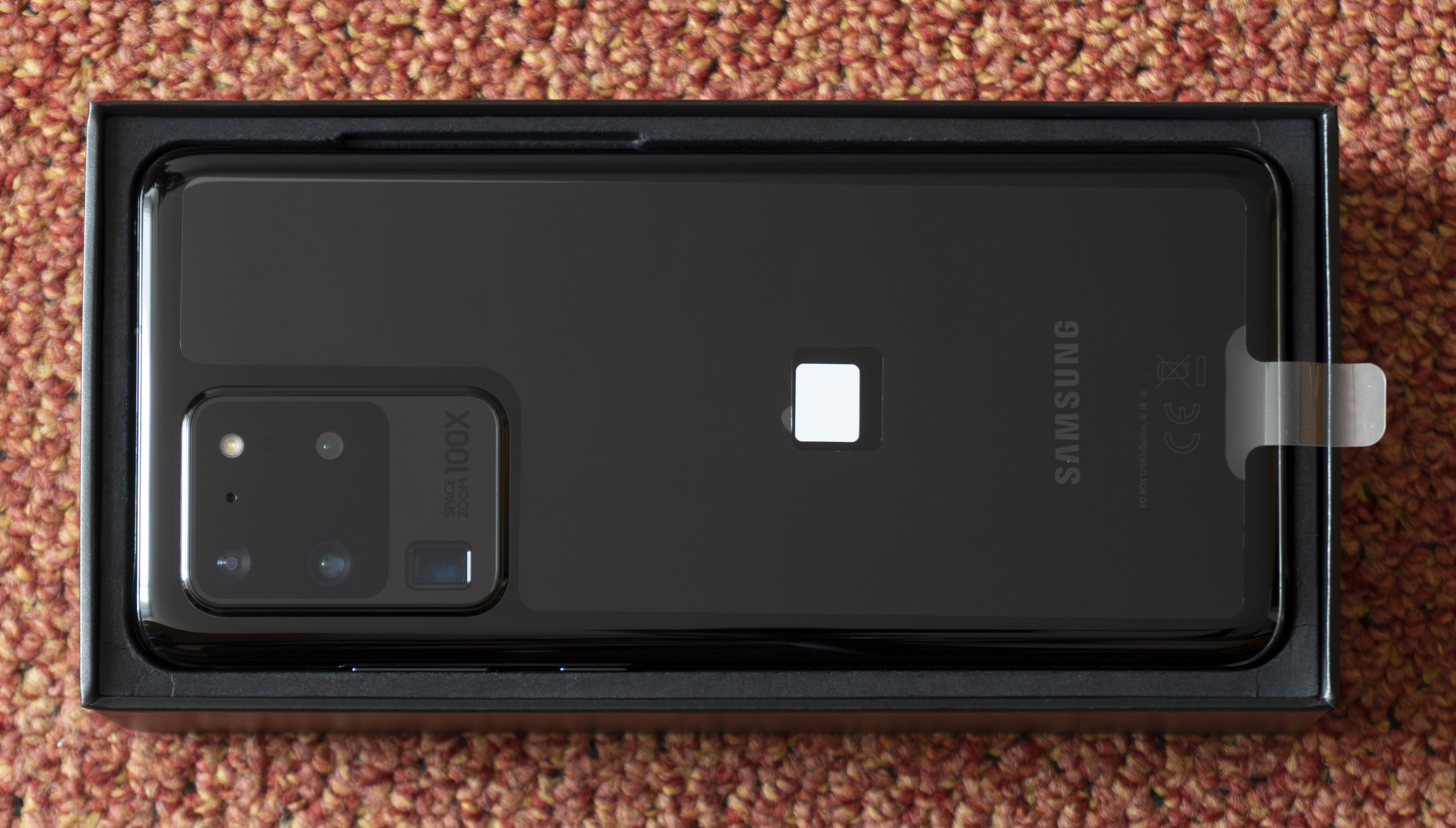 Rückseite des Galaxy S20 Ultra. Fotografiert mit einer Kamera auf Stativ.